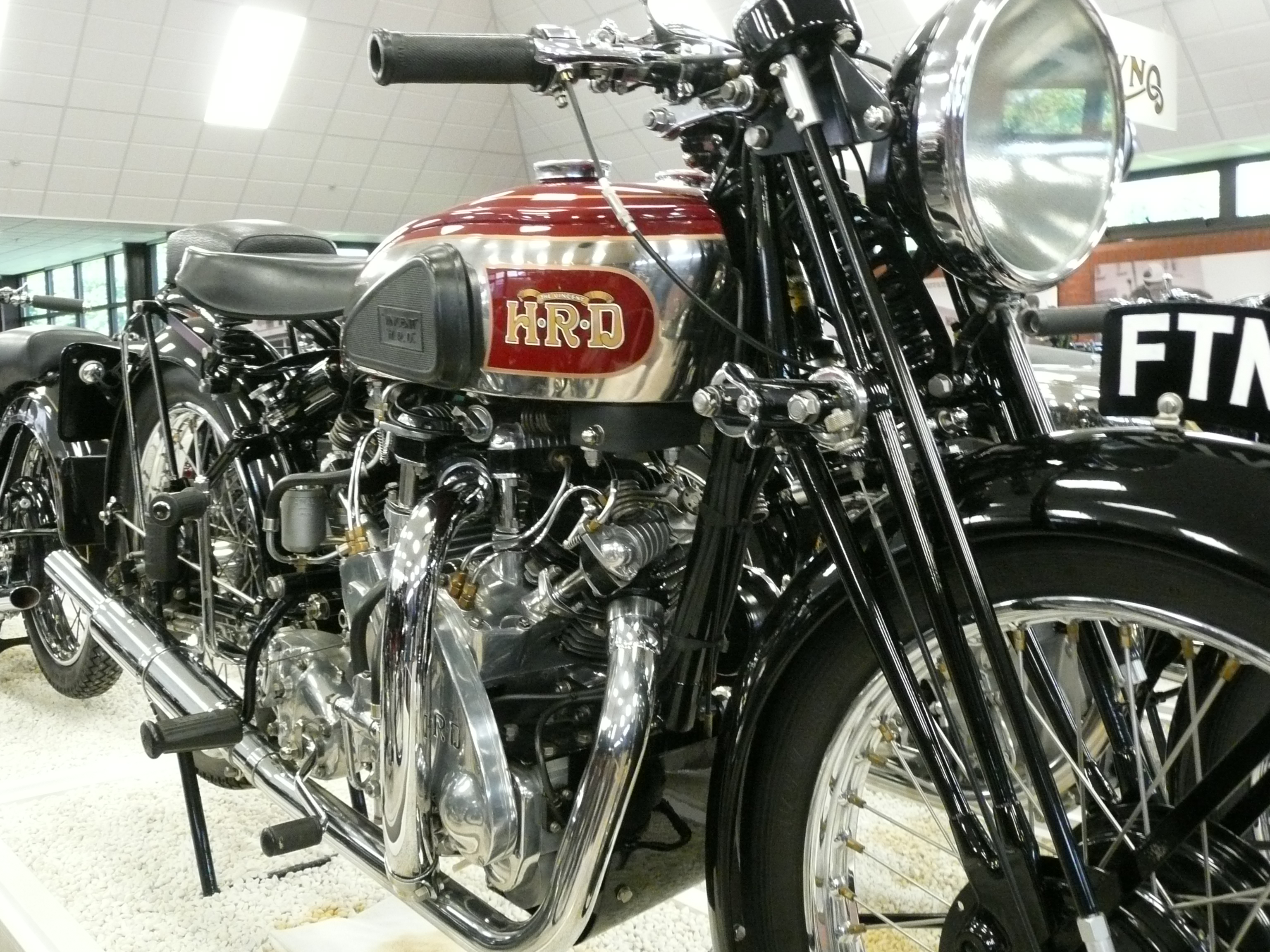 Vincent Rapide Series A (1939)